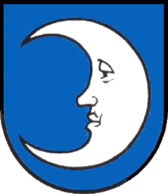 Wappen der politischen Gemeinde Frenkendorf, Schweiz